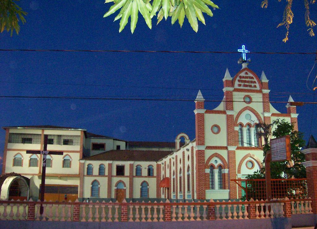 Igreja Matriz de Santa Teresa. Imperatriz Maranhão.